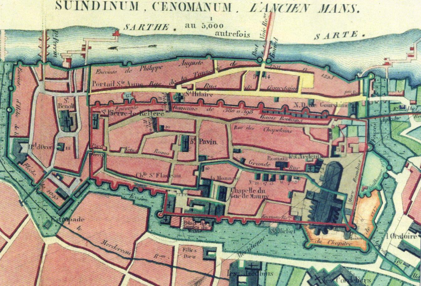 Un plan archéologique du Mans reconstitué au XIXème siècle